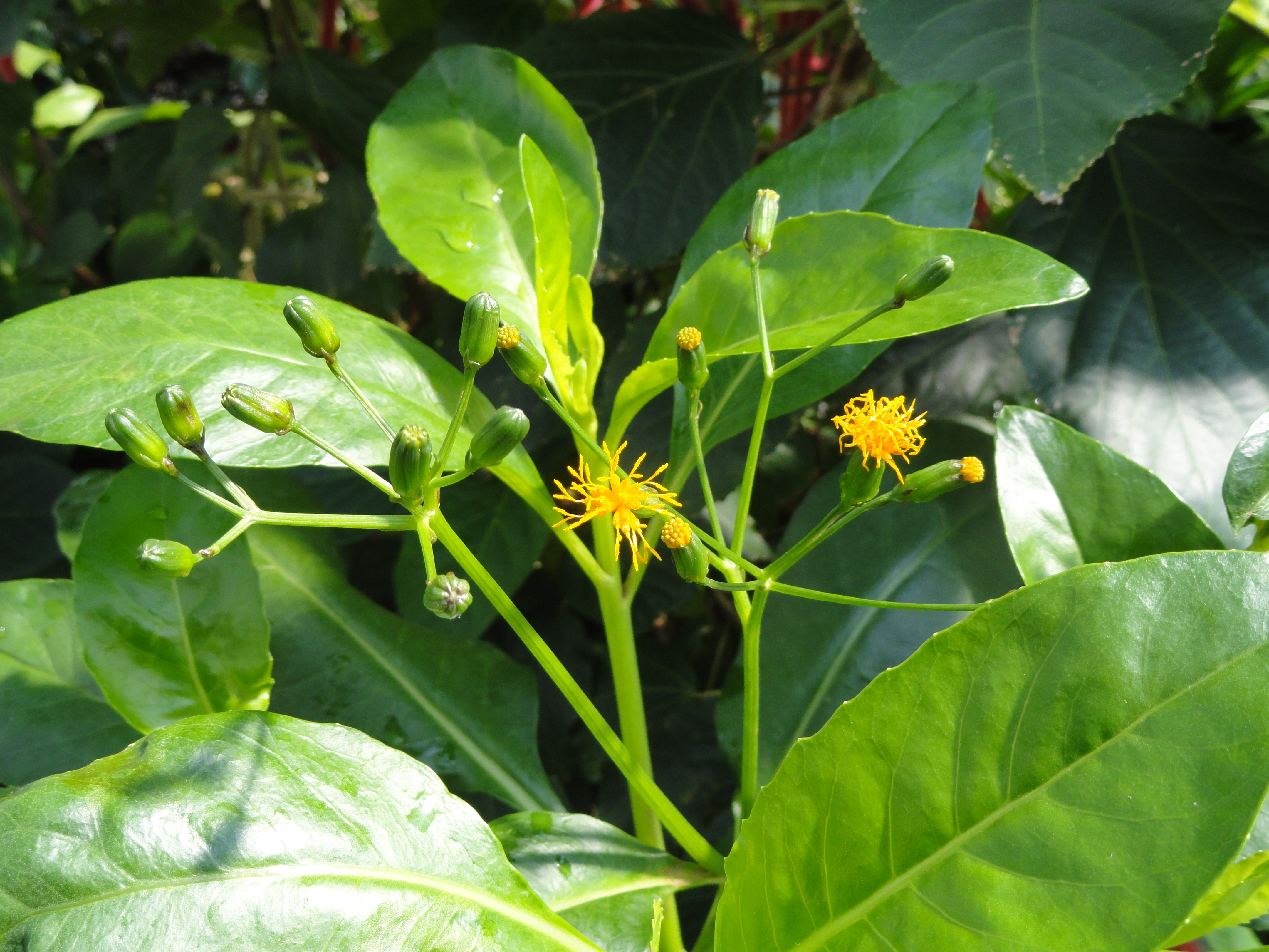 Gynura sechellensis specimen in the Botanischer Garten München-Nymphenburg, Munich, Germany.